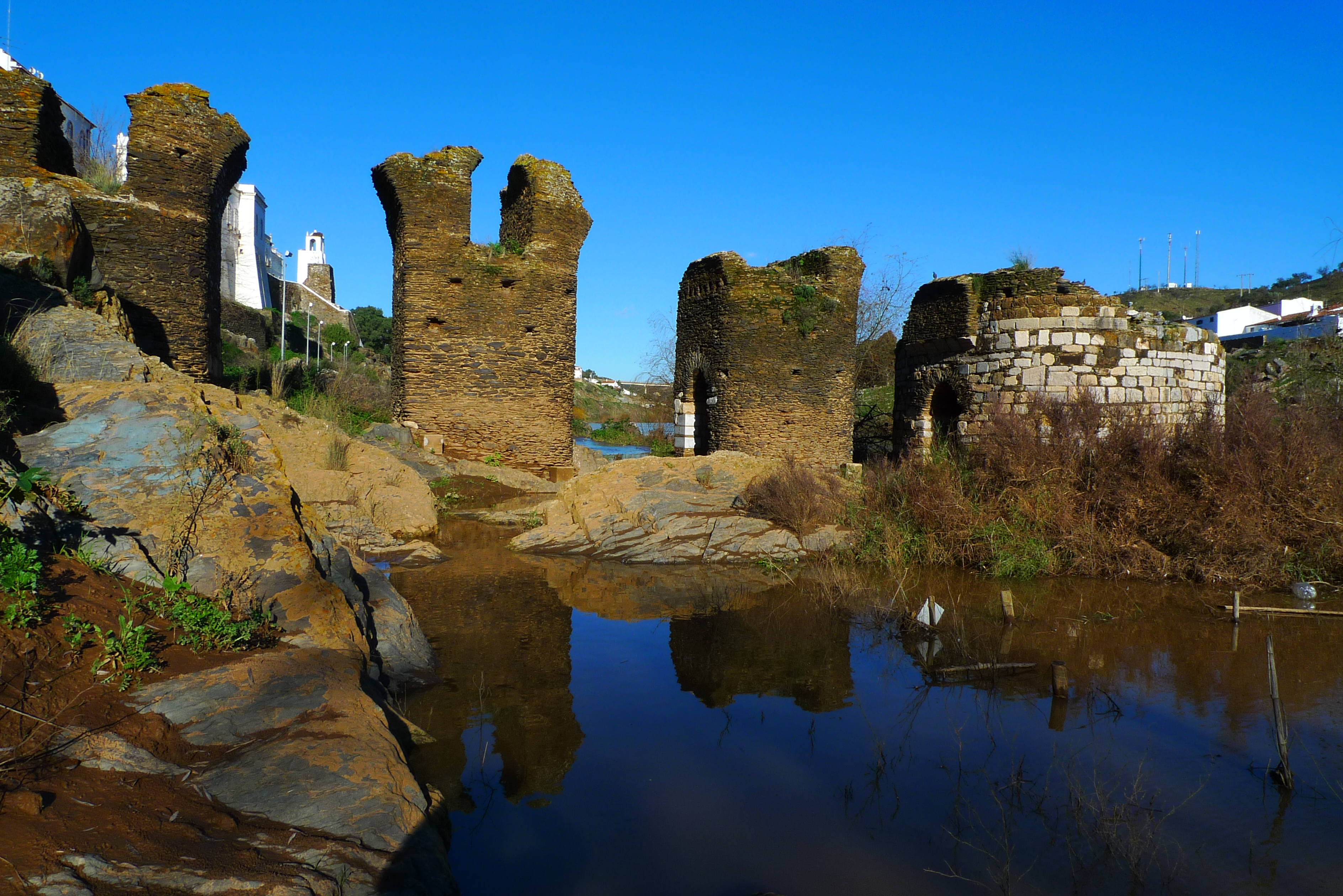 Vista del lado sur, río abajo, de tres pilares y, a la derecha, de la torre. La fotografía fue tomada después de una riada moderada. This file was uploaded for Wiki Loves Monuments in Portugal with the unique identifier 70233.